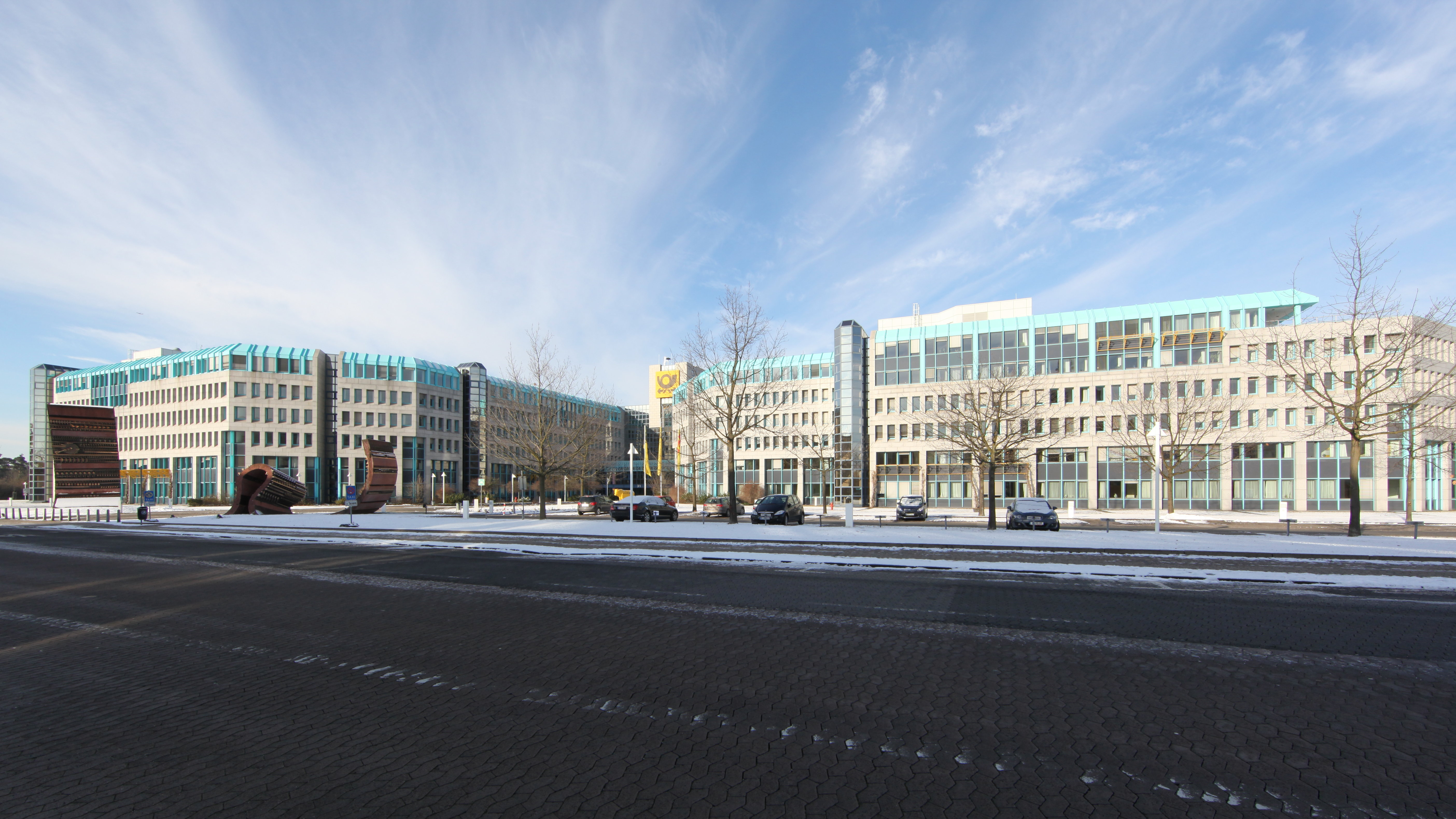 Hilbertstraße, ehemaliges PTZ in Darmstadt